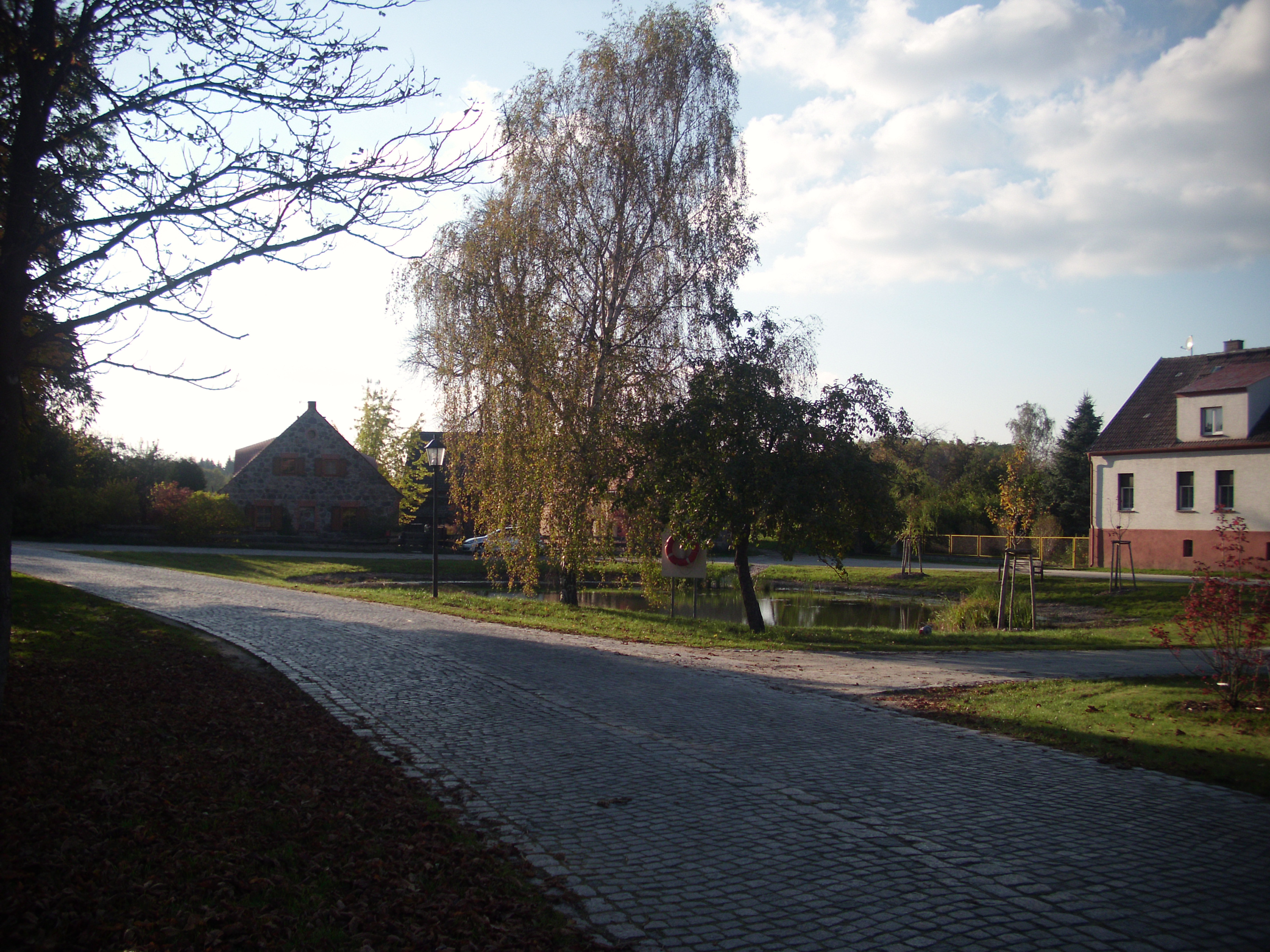 Kopfsteinpflasterstraße, Reicherskreuz, Naturpark Schlaubetal, Brandenburg